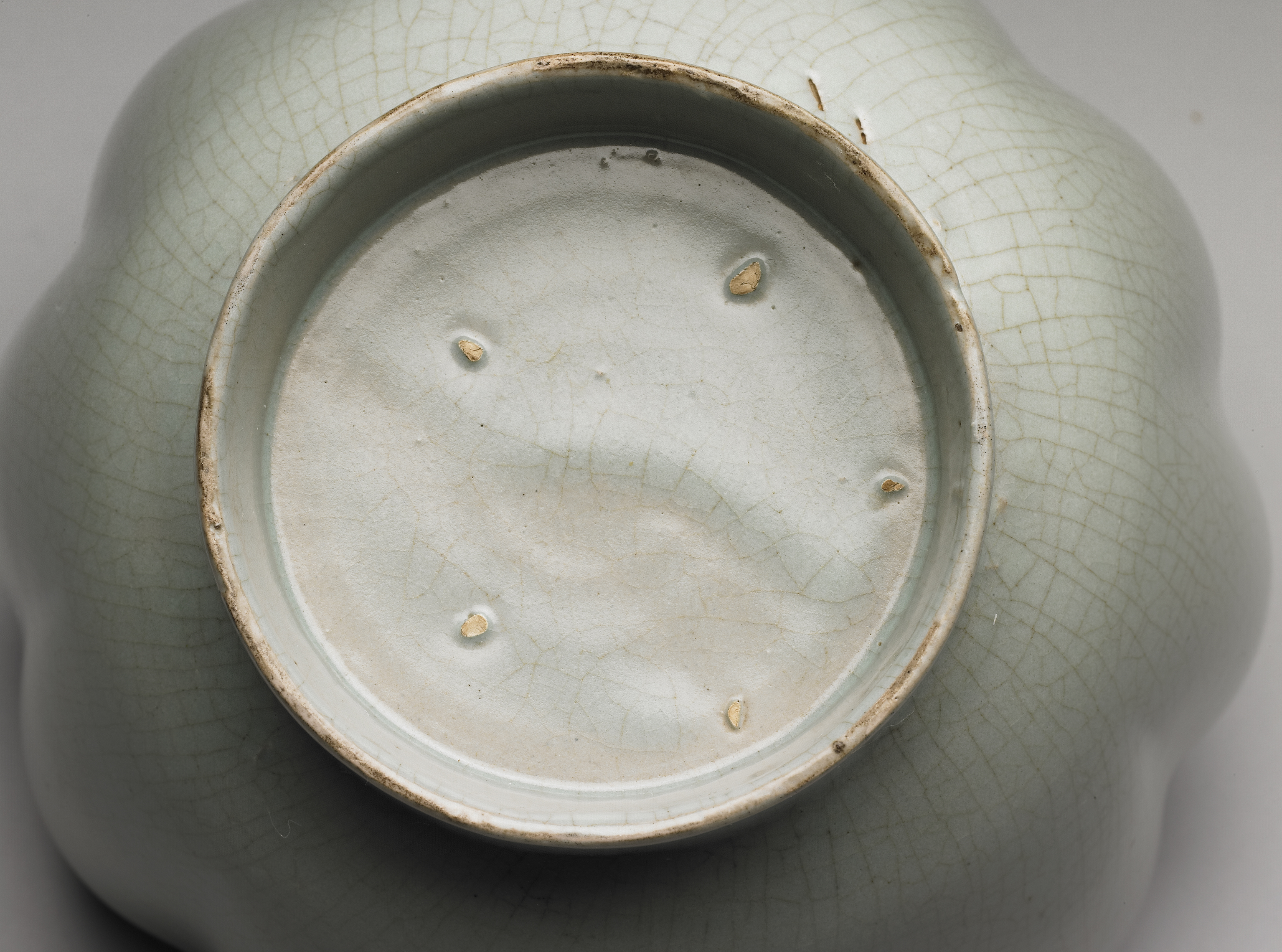 中文（中国大陆）: 北宋汝窯青瓷蓮花式溫碗_底部